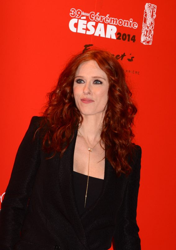 Audrey Fleurot à la cérémonie des César